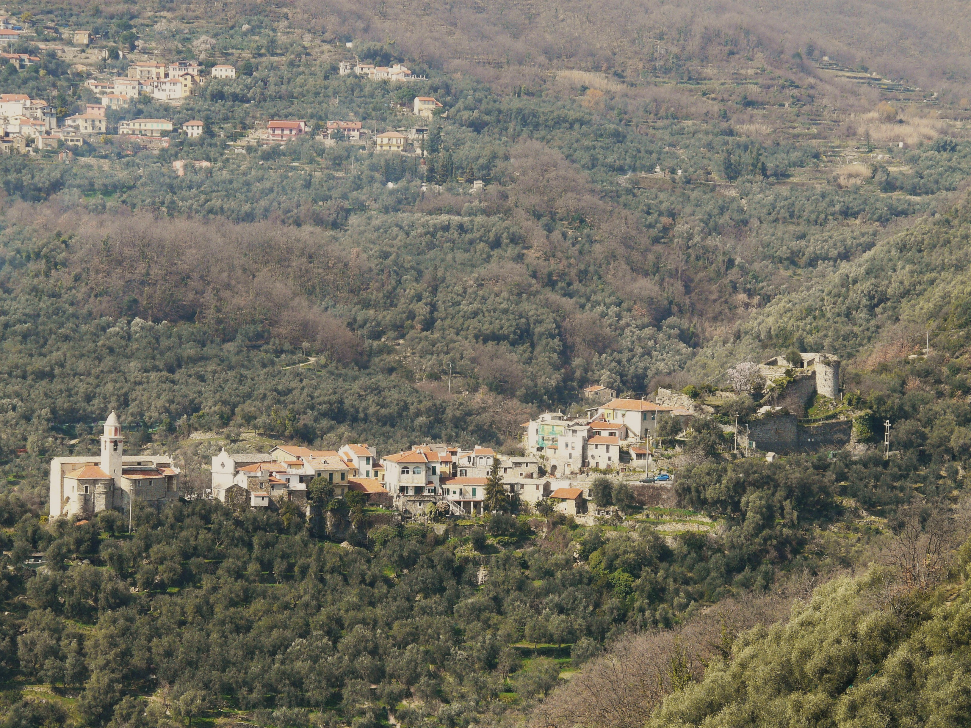 Prelà Castello, Vasia, Liguria, Italia